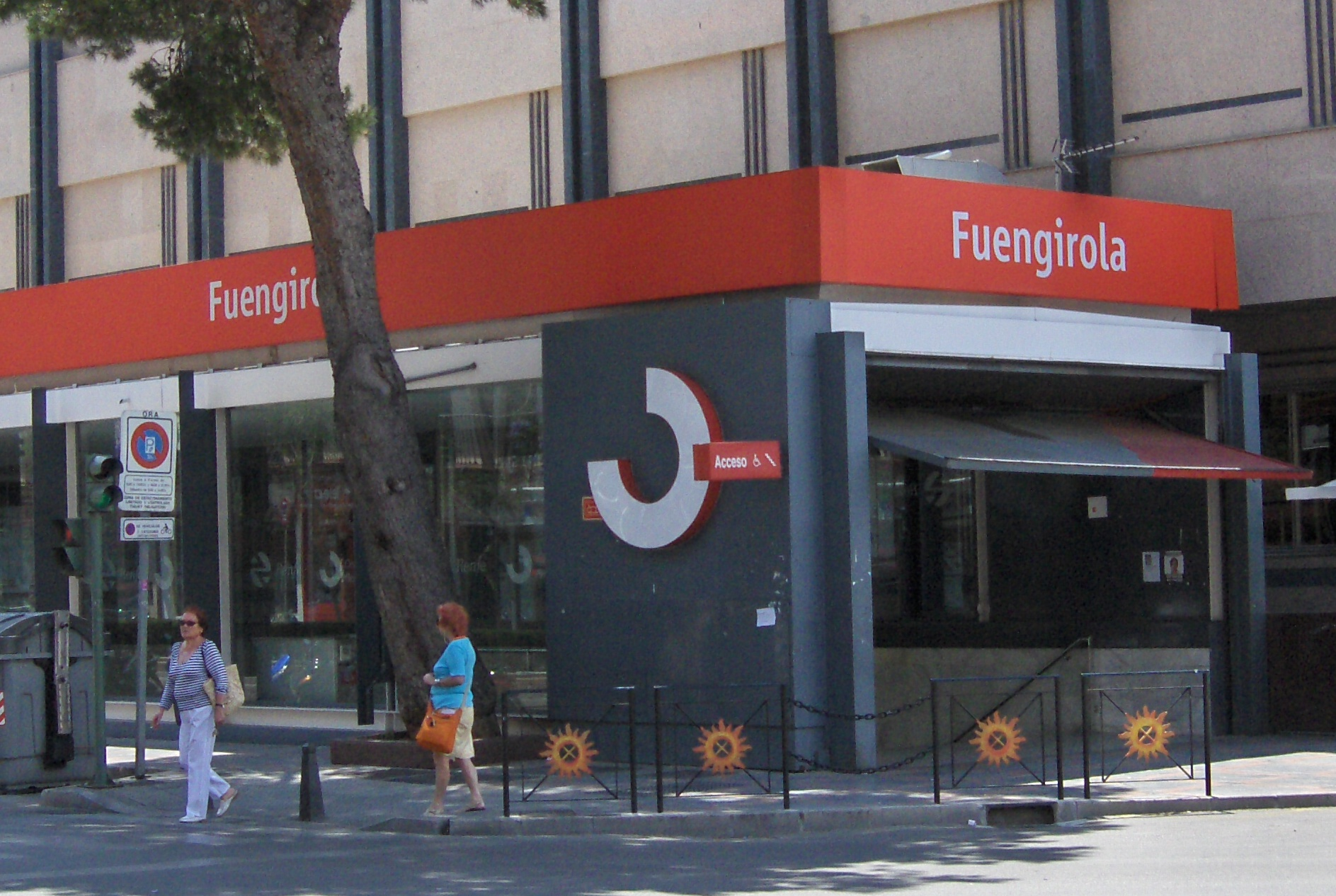 Estación de Fuengirola de la línea C1 del Cercanías Málaga.